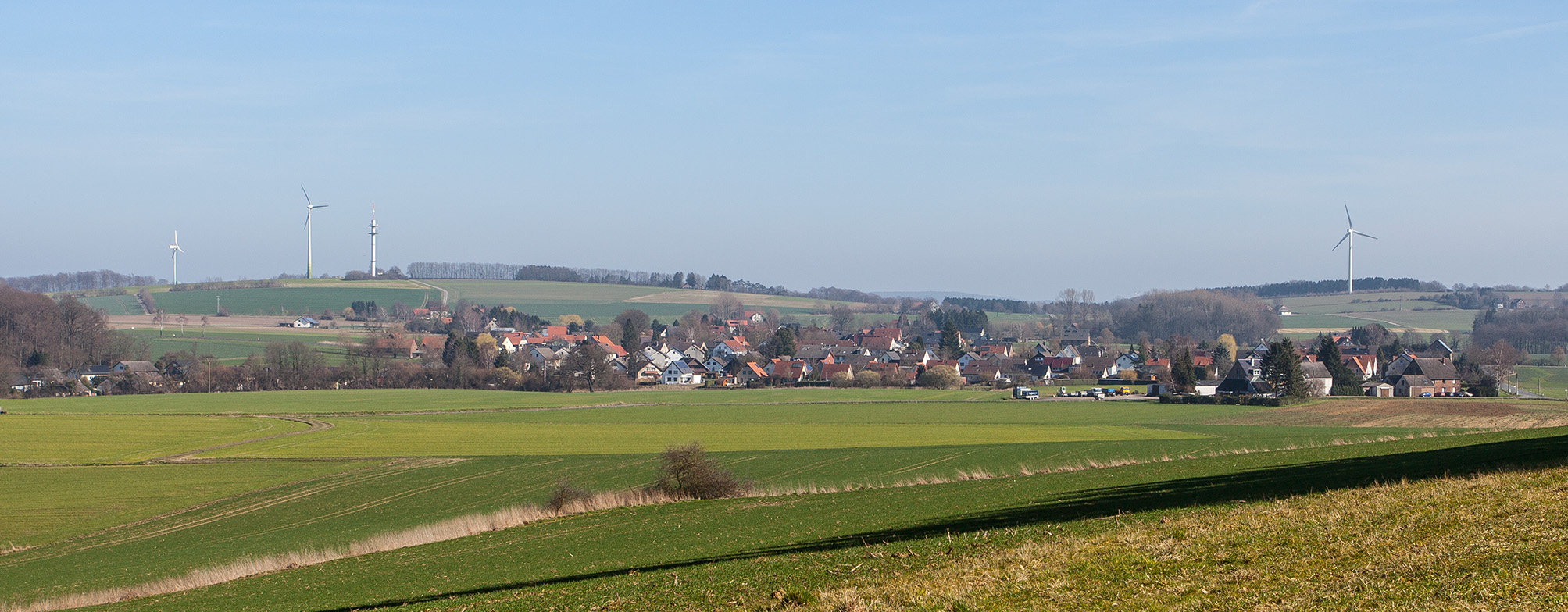 Wahmbeck (Lemgo), Ansicht von Westen